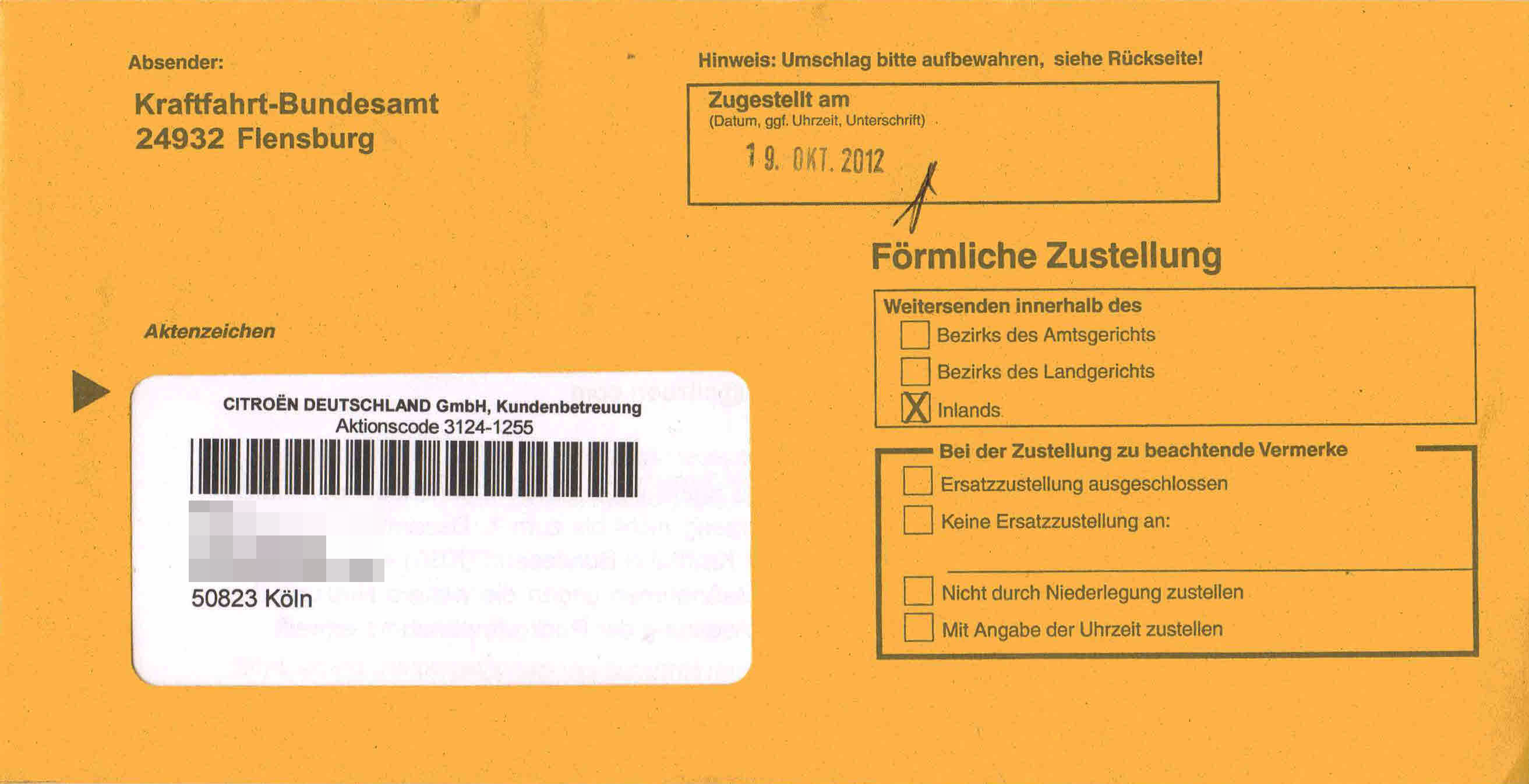 Förmliche Zustellung des Kraftfahrt-Bundesamtes mit einem Rückrufschreib von Citroën Deutschland